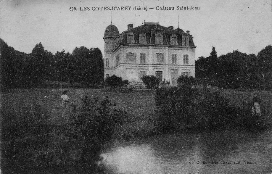 Château Saint-Jean Les Côtes-d'Arey, Isère, France.